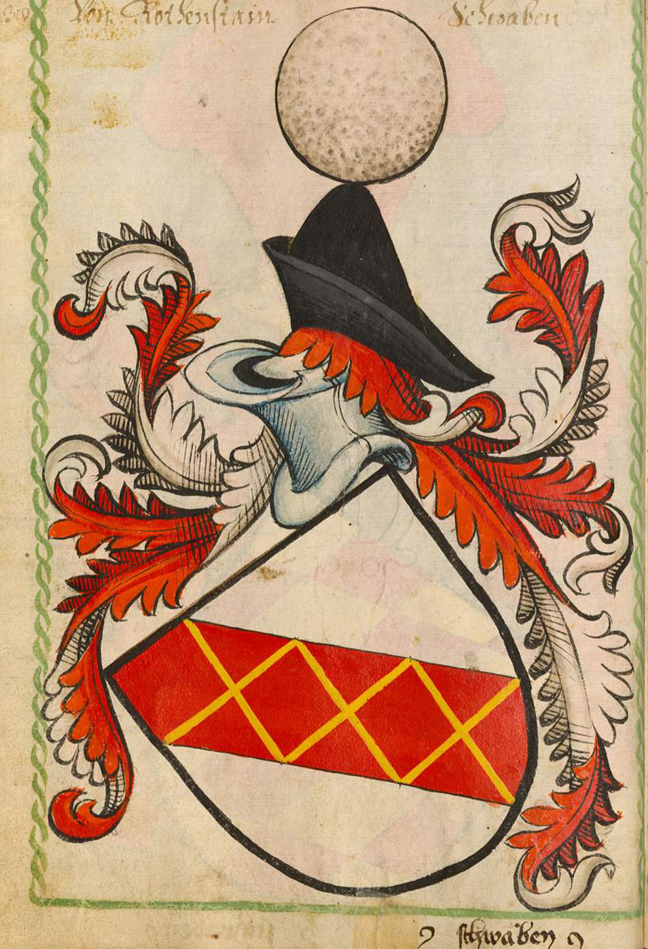 Scheibler'sches Wappenbuch, älterer Teil Wappen der Familie Rothenstein.